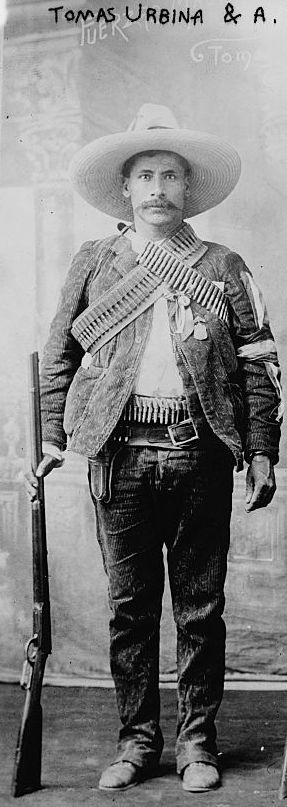 General Tomas Urbina